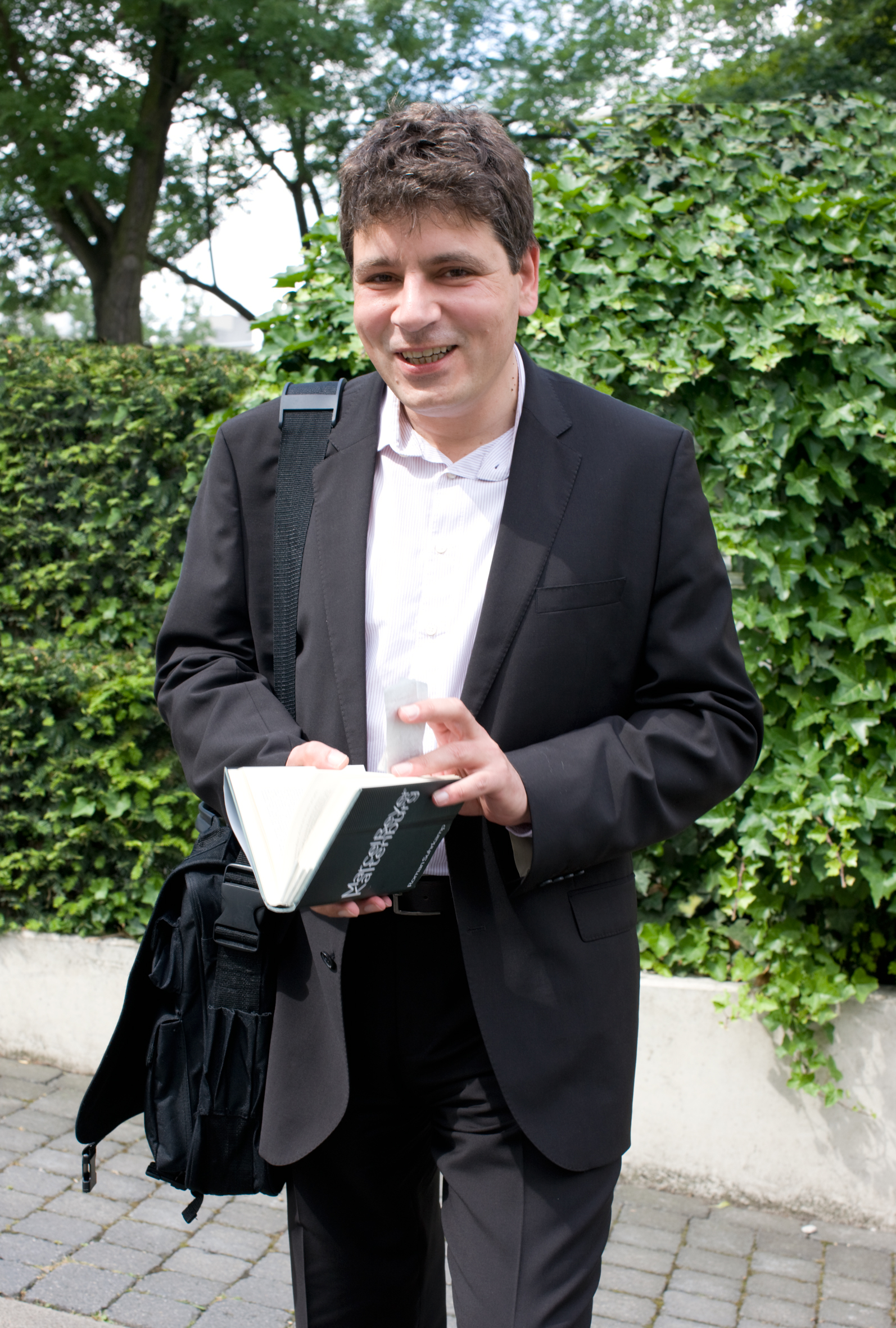 Marcel Beyer, Schriftsteller, vor dem Literaturhaus Köln (15. Juni 2008)